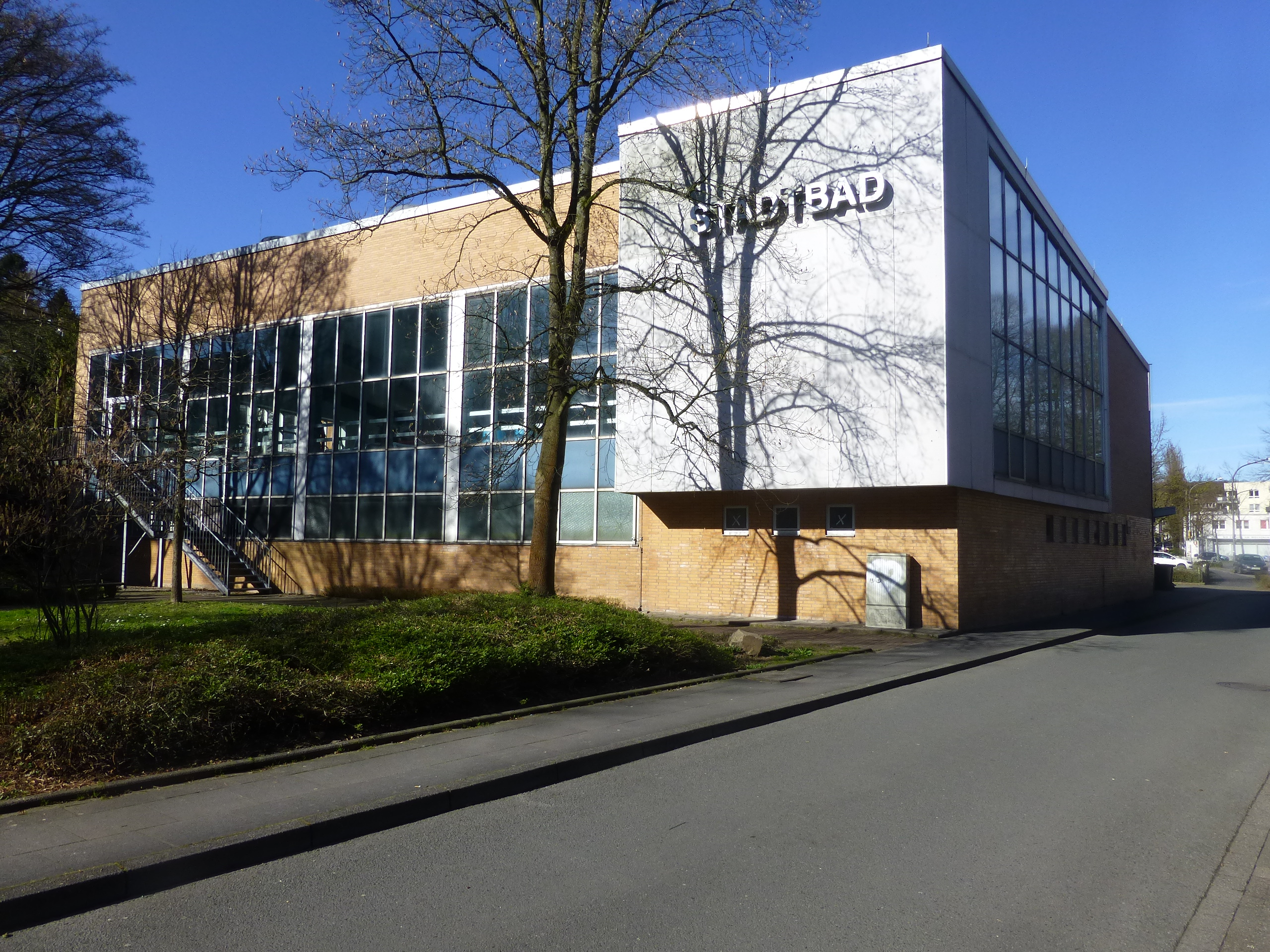 Am Stadtbahnhof, Wuppertal